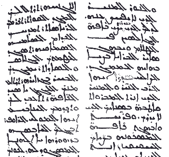 Copy of Reesh Qoryan